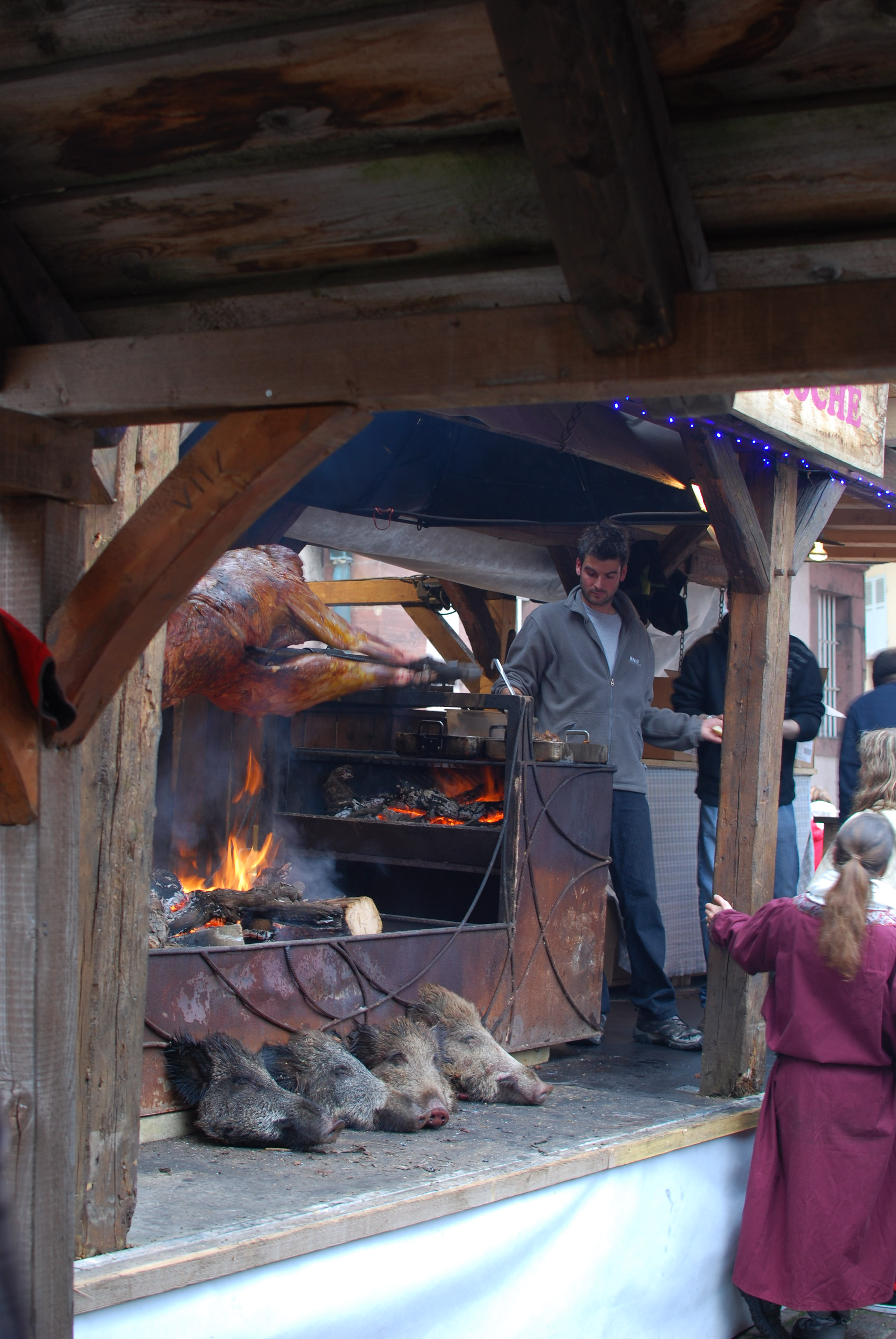 lors de la Sortie photo à Aubure de WikiFr en déc 2014.